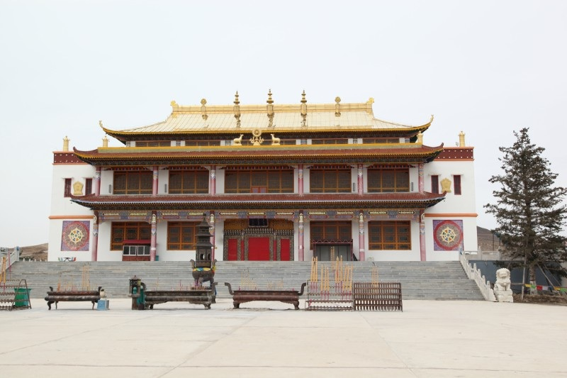 中文（中国大陆）: 吉林白城葛根庙1